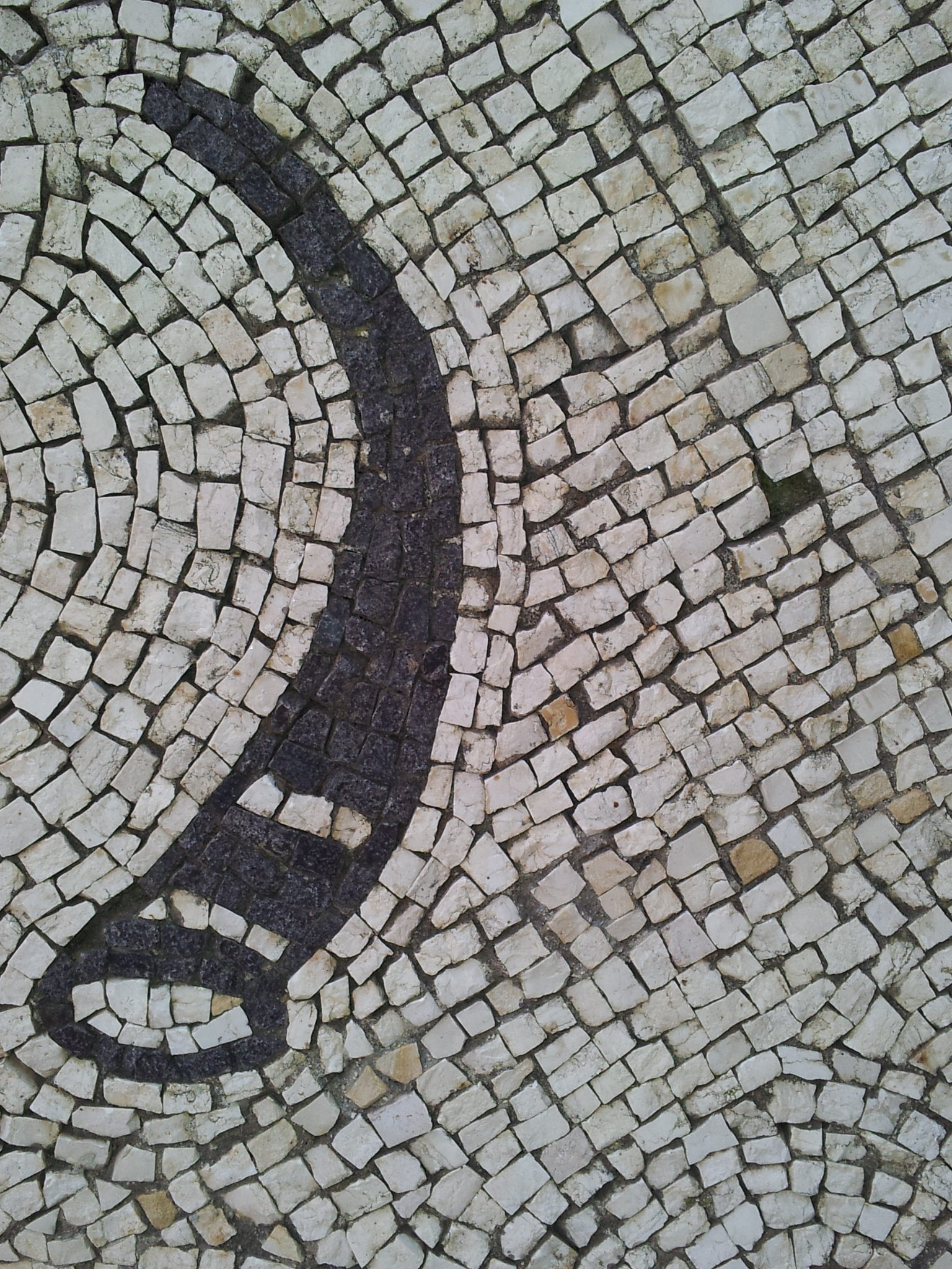 שופר - פרט בפסיפס מעון במתחם יד יצחק בן-צבי בירושלים